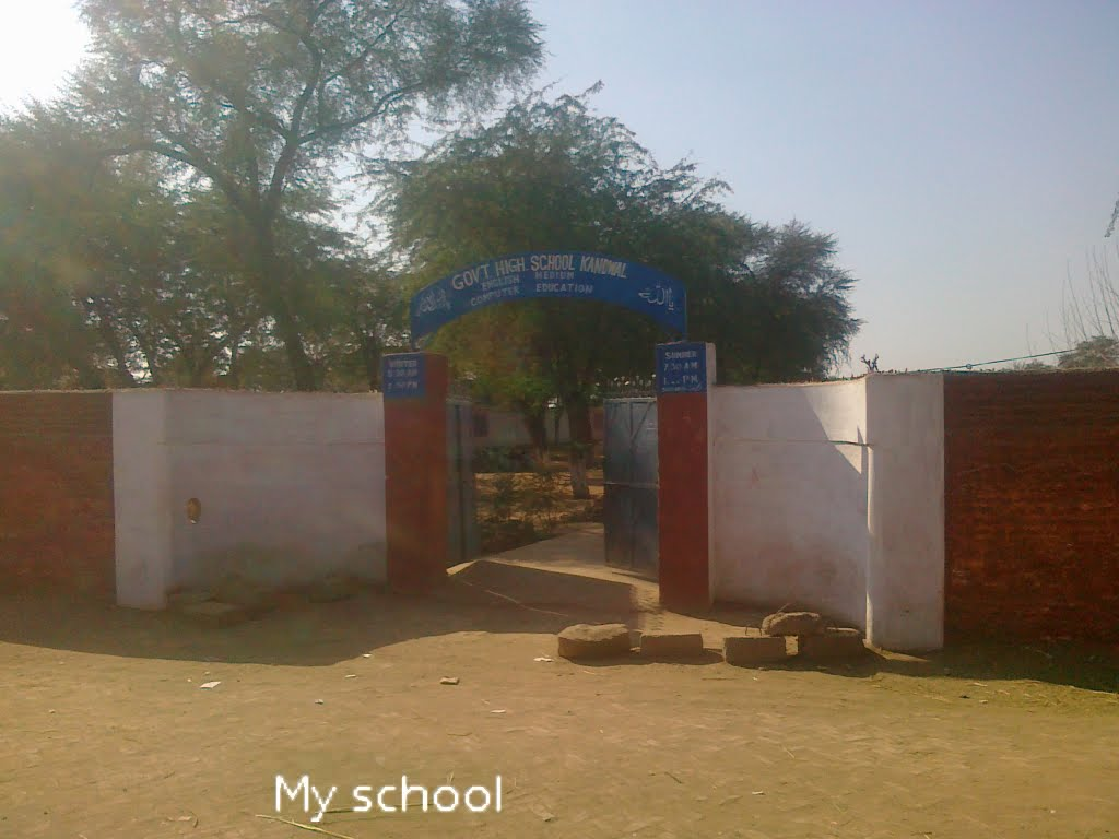 High school kandwal